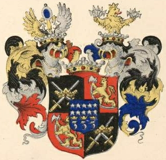 Rehbinderi suguvõsa vabahärravapp